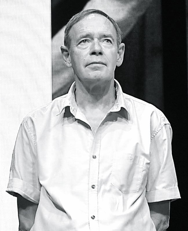 Per Mattsson under Öppet hus på Dramaten den 6 september 2014.